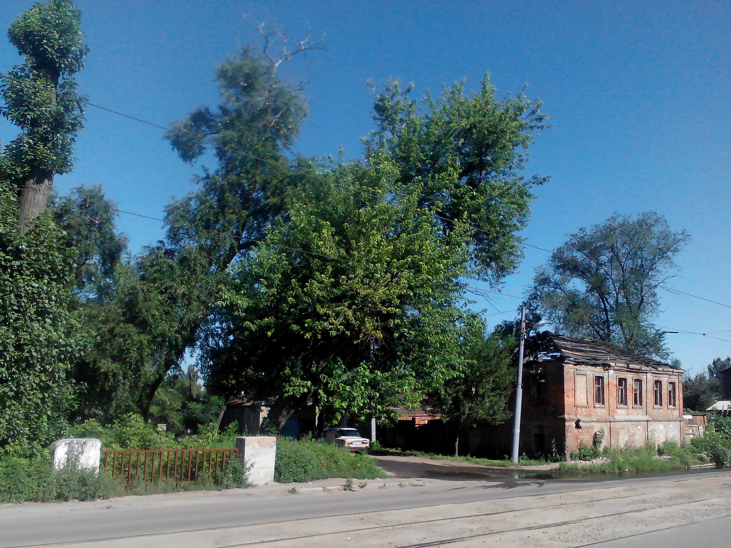 Україна. Харків.Перетин Нетеченського бульвару та Рибасівського провулку. Є можливість побачити місток через річку Нетечу. Річка тече (світлина) справа наліво.